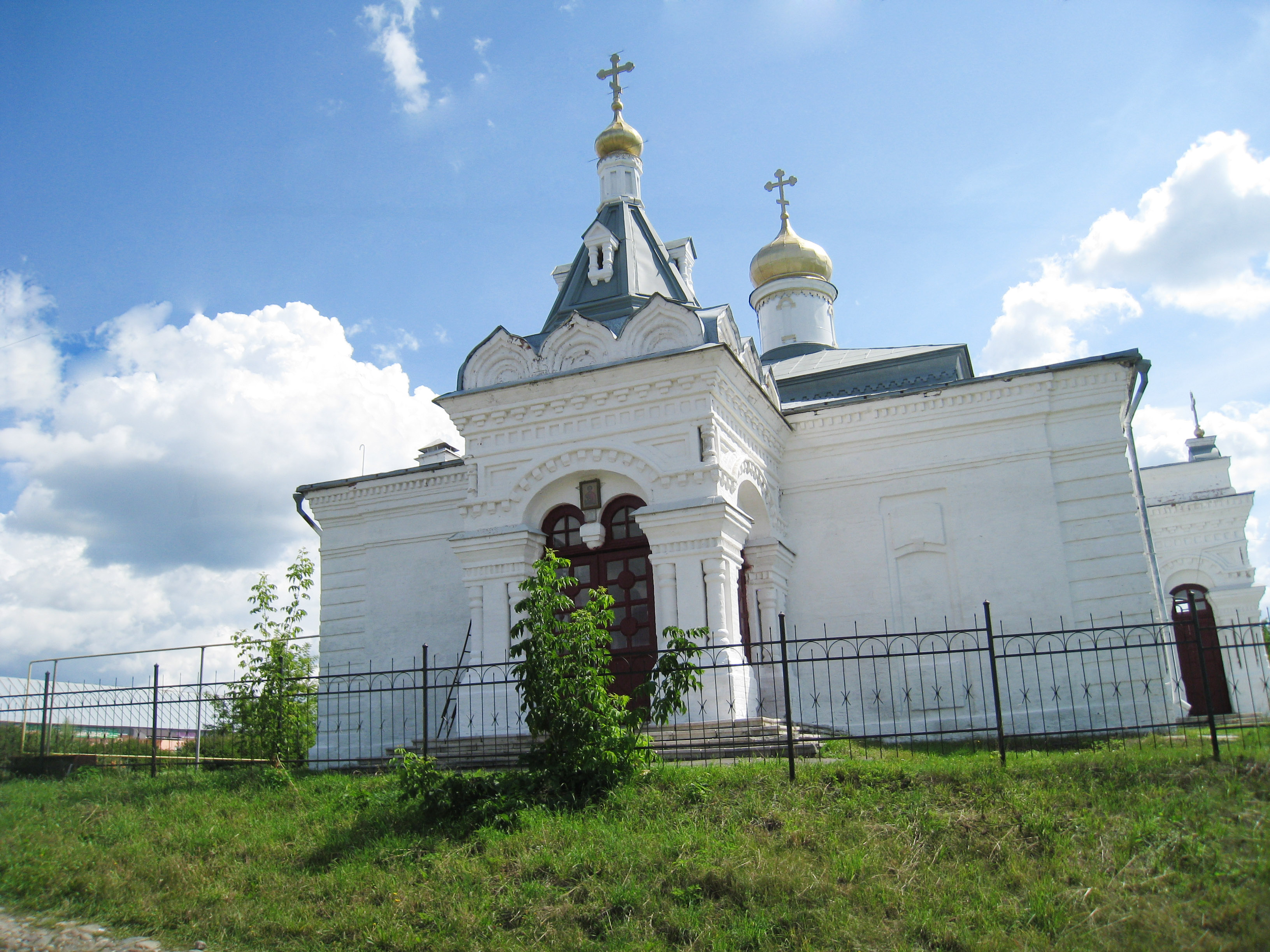 Церковь Димитрия Солунского: Сима, Юрьев-Польский район, Владимирская область